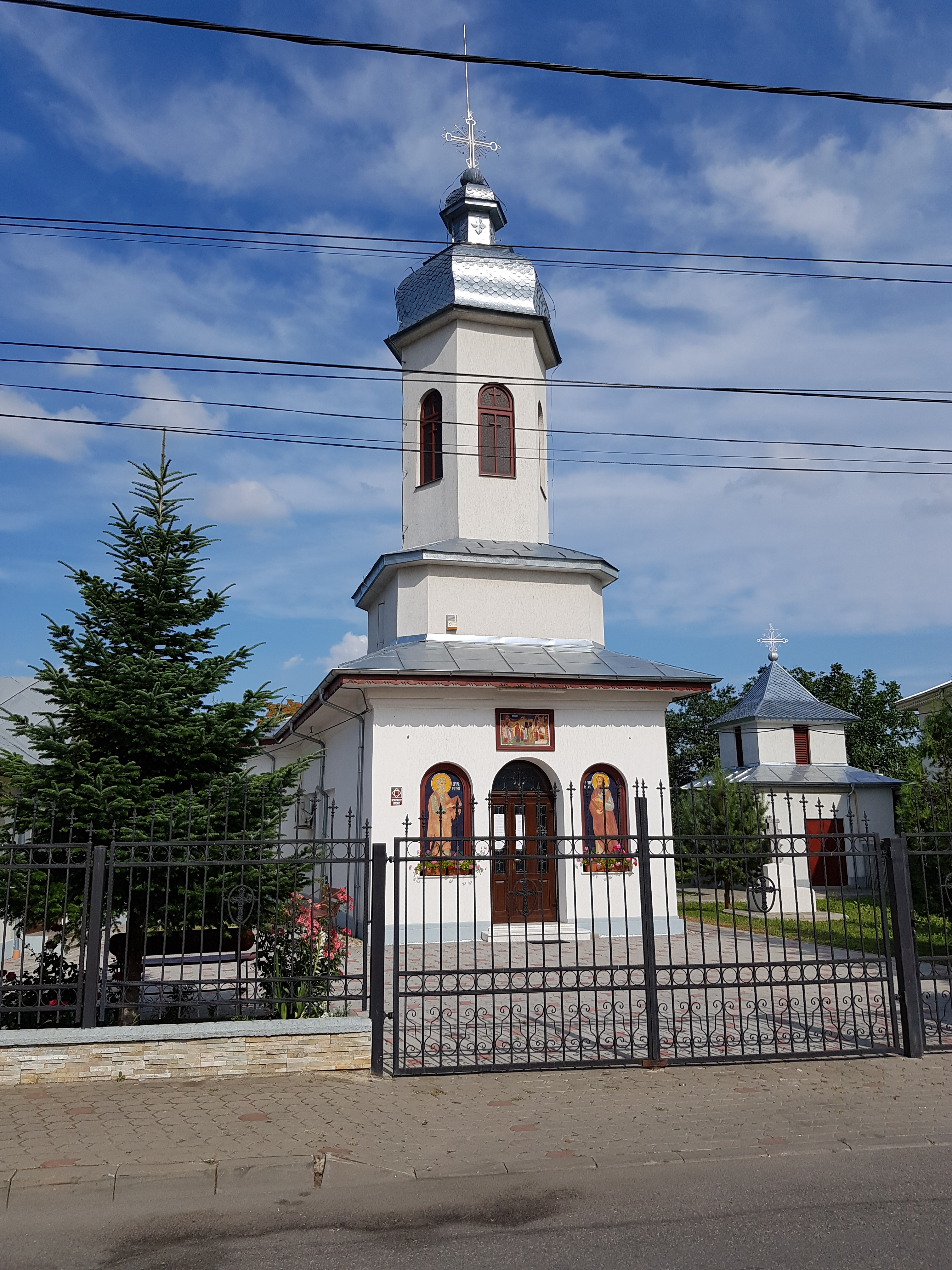 Biserica „Intrarea Maicii Domnului în Biserică”